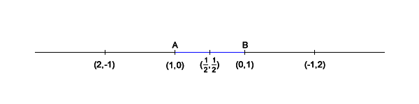 Normierte baryzentrische Koordinaten einiger Punkte